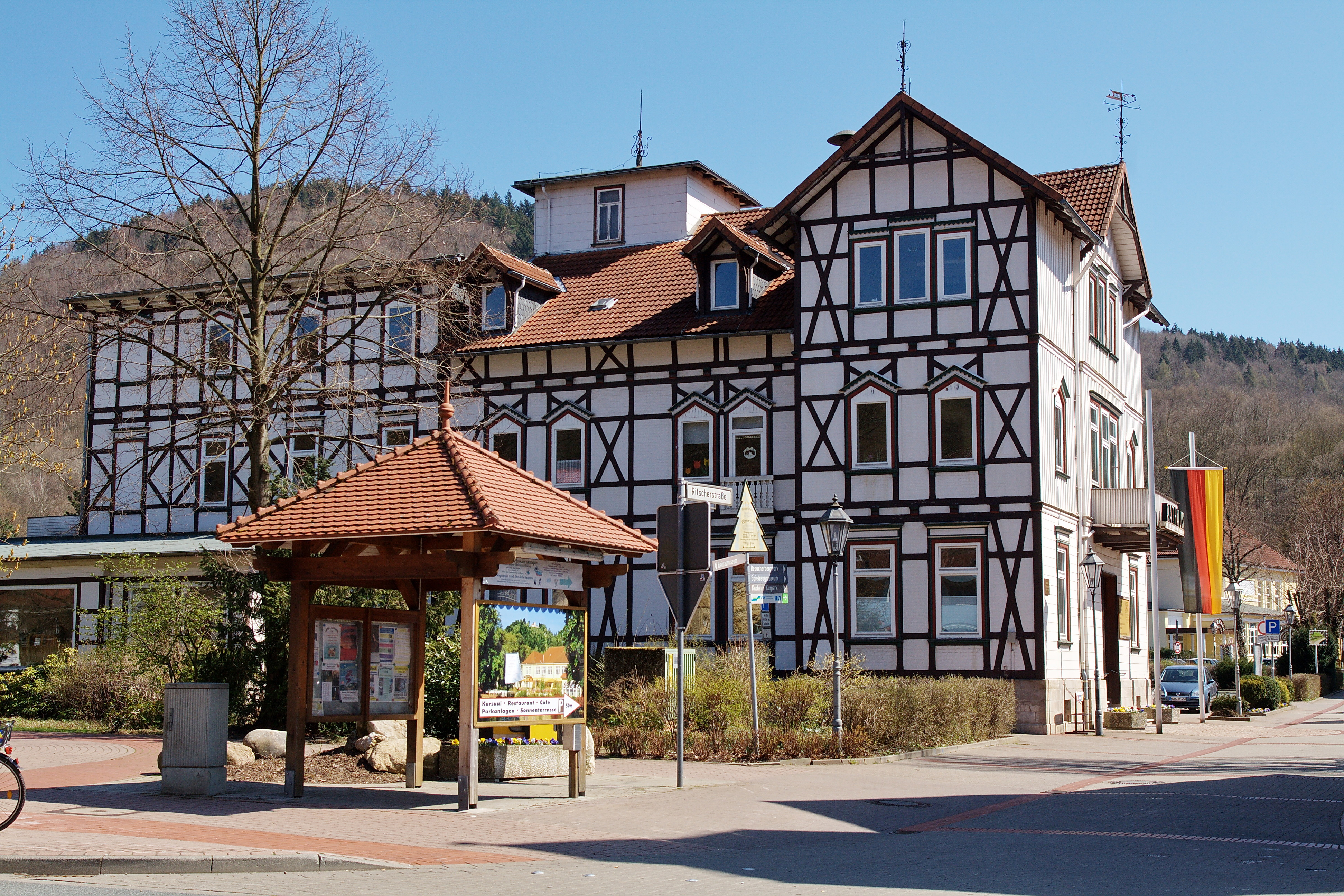 Bad Lauterberg (Harz) in Niedersachsen, Deutschland